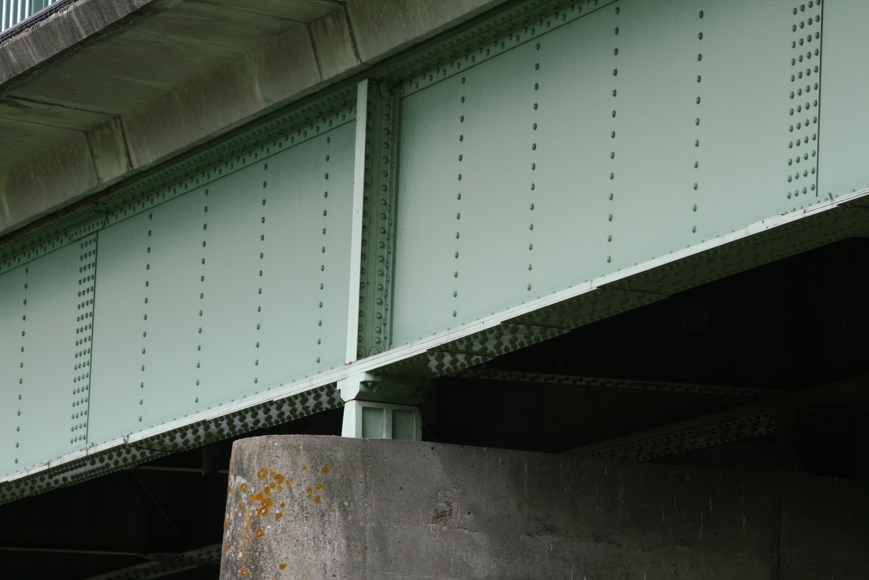 Le pont du Maréchal Joffre sur la Loire, Orléans, Loiret, France – Vue rapprochée d’une poutre